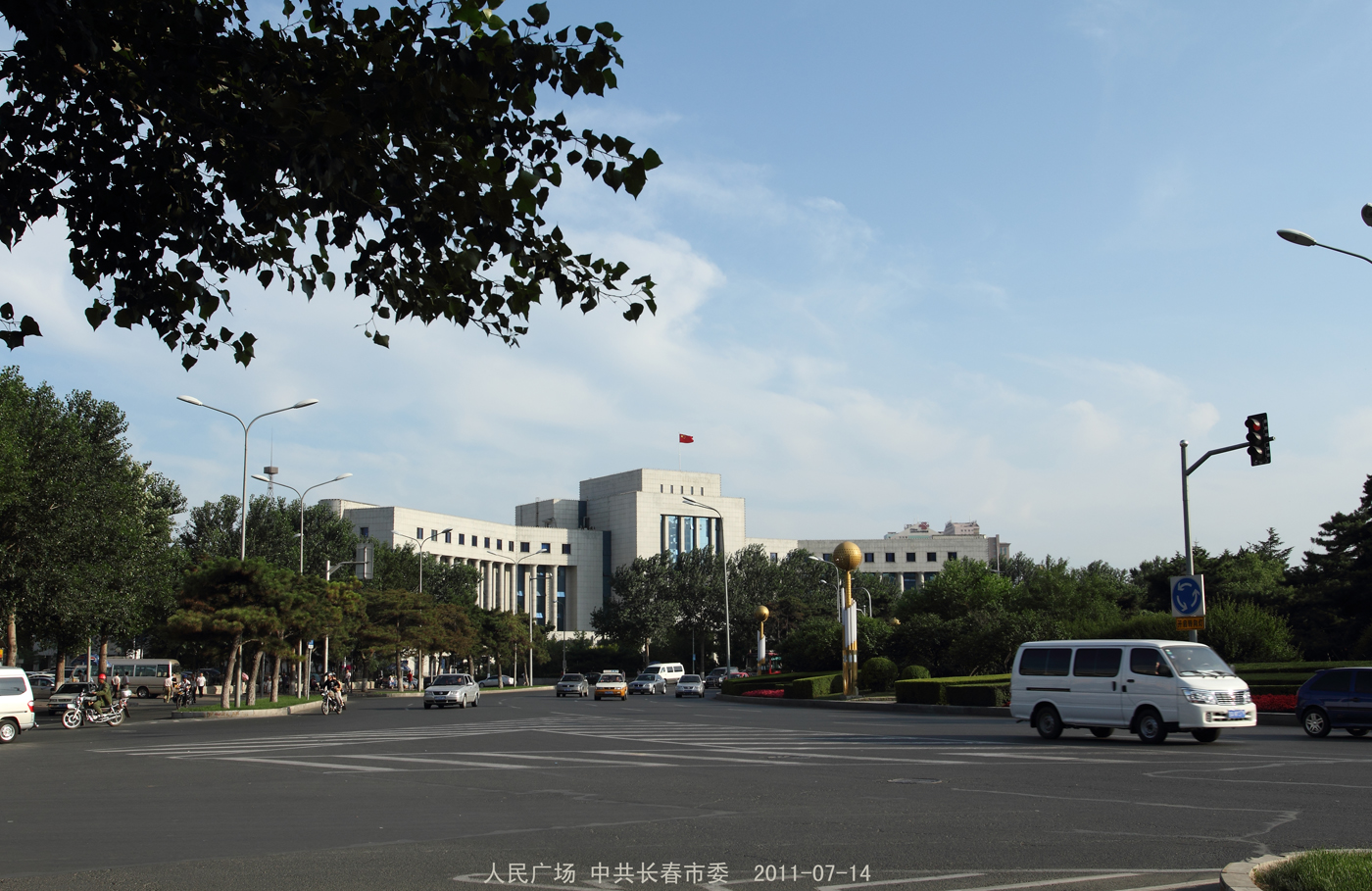 原满洲国文教部、新京特别市公署、国都建设局位置（原建筑已经拆除）